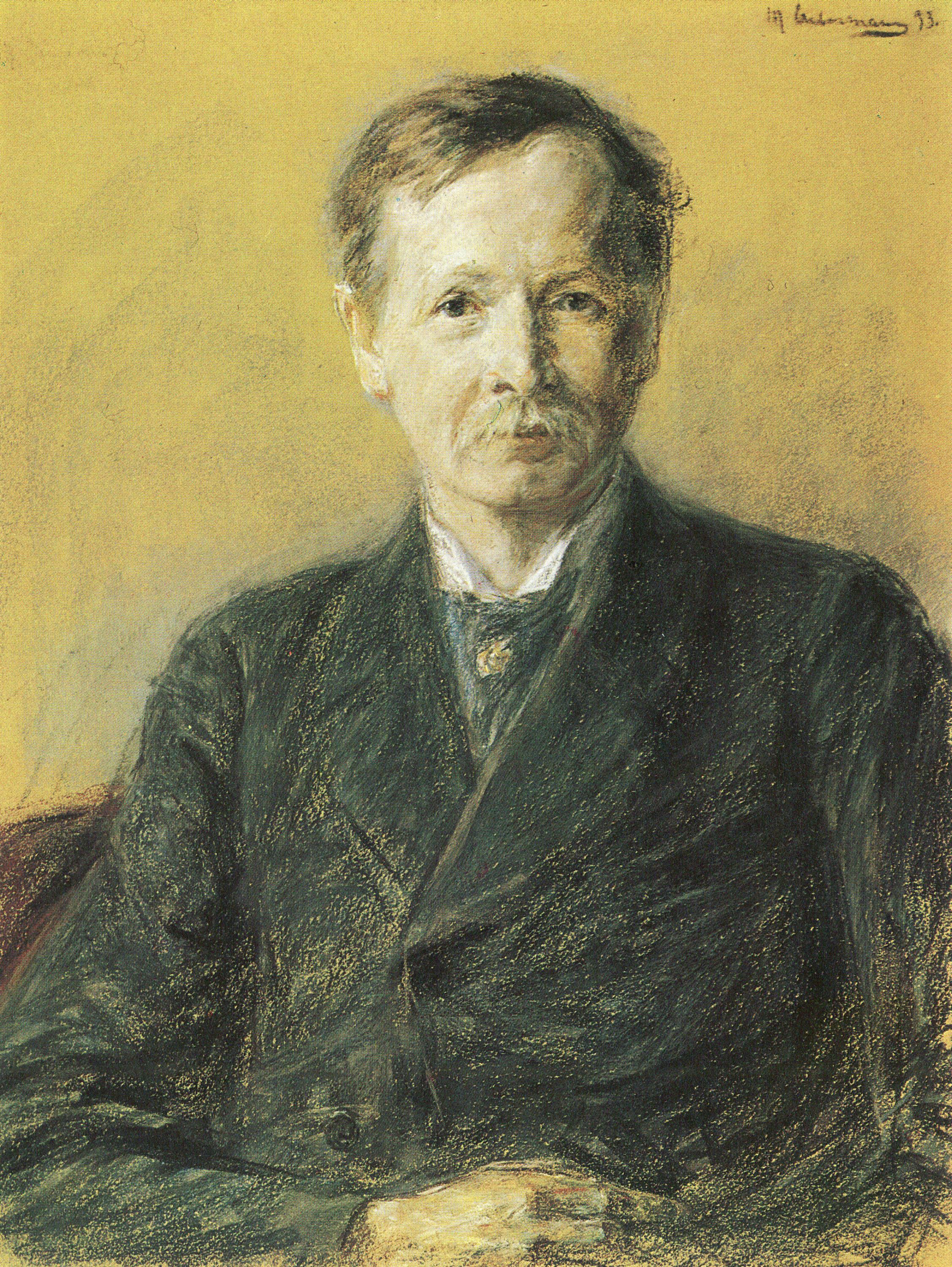 Porträtt av arkitekten Hans Grisebach